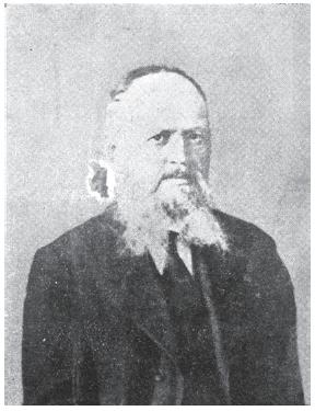 Благой Димитров.